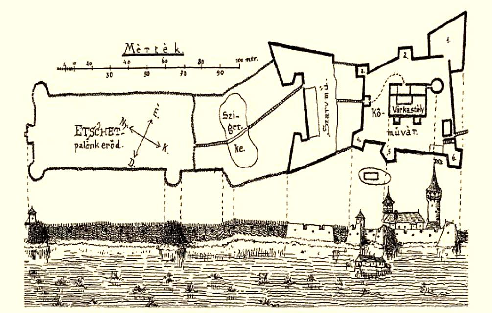 Soós Elemér (Nádasd, 1844. június 16. – Budapest, 1929. február 2.) honvéd ezredes, genealógus, hadtörténész várábrázolása Ecsed váráról